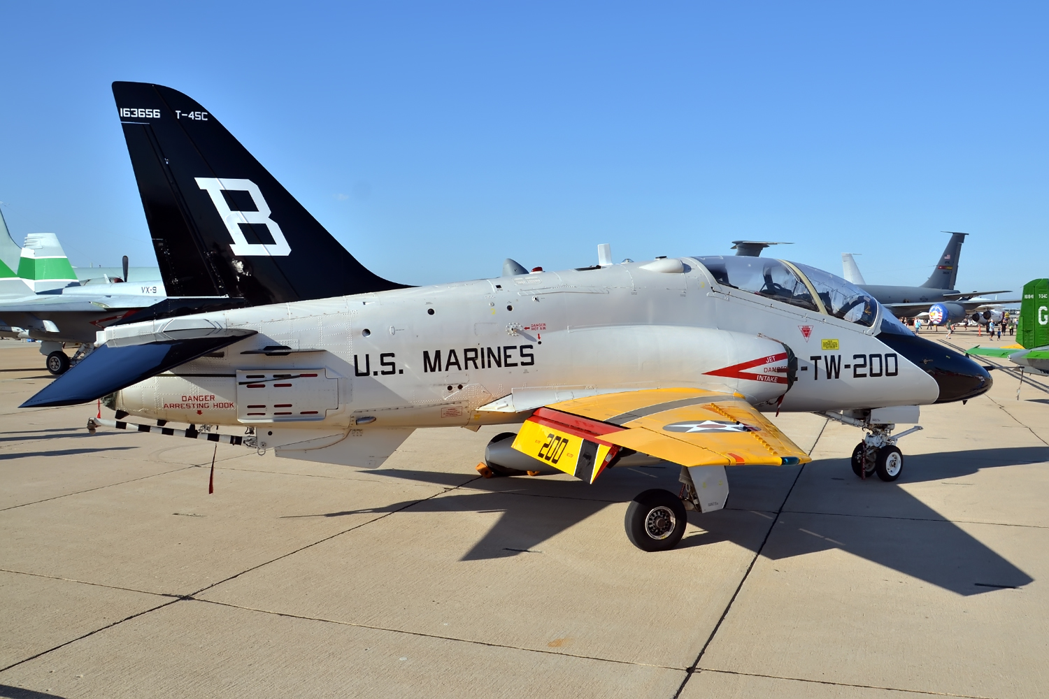 MCAS Miramar